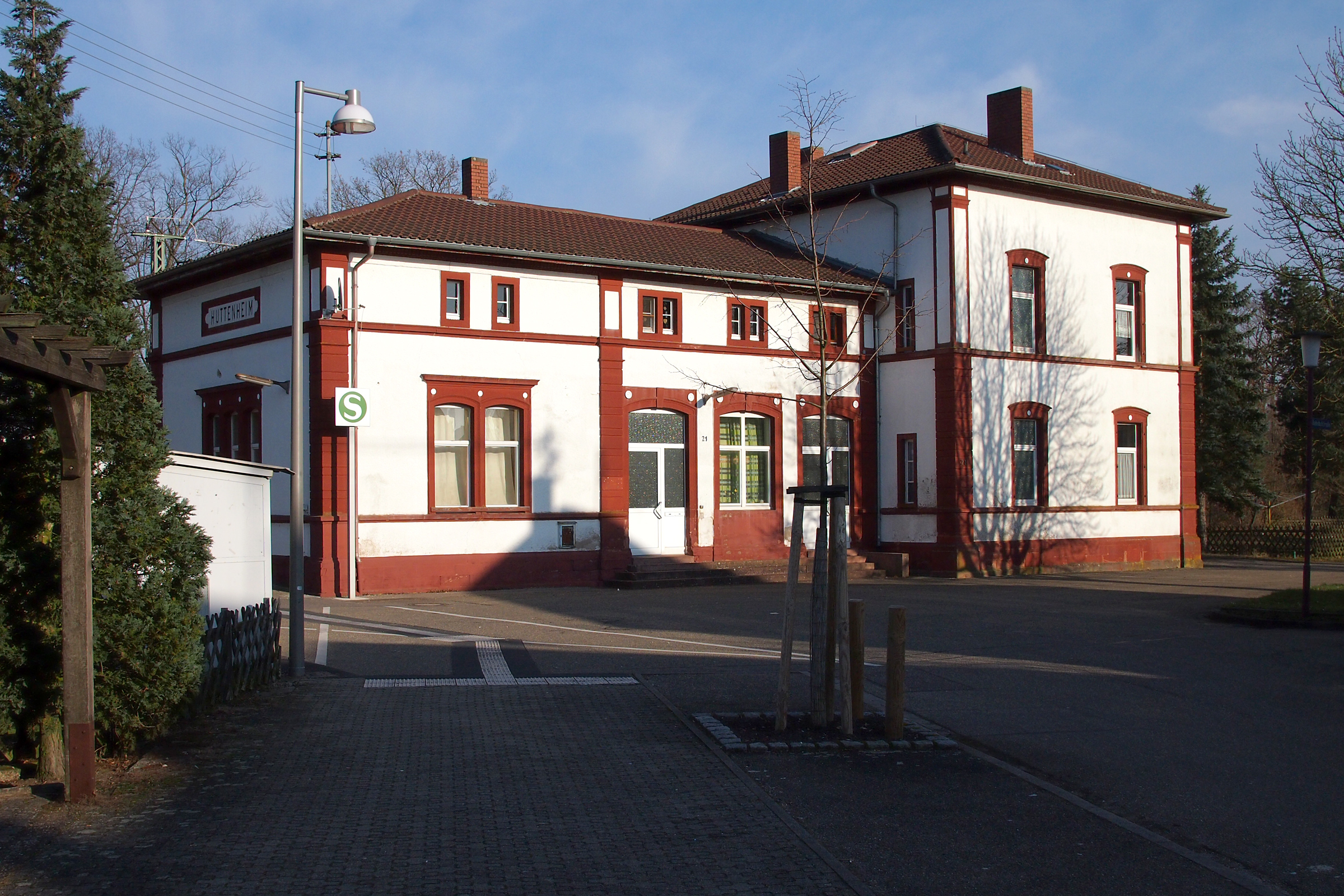 Philippsburg (OT Huttenheim), Bahnhof